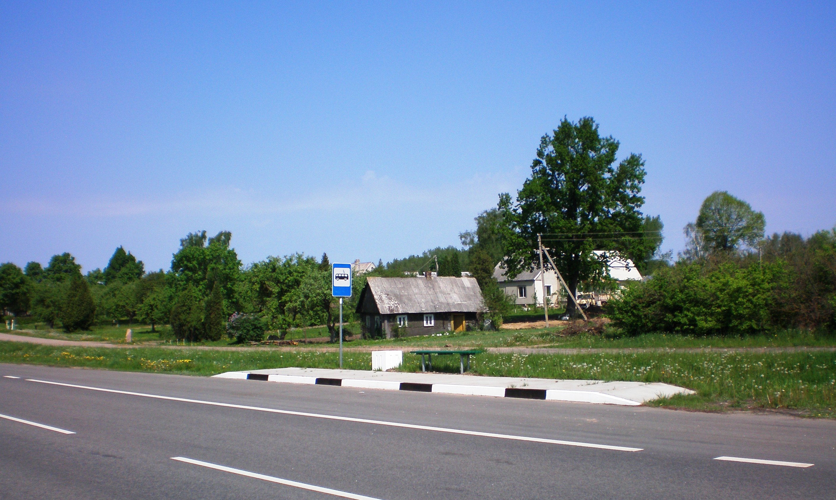 Bokštai, Kėdainių raj.